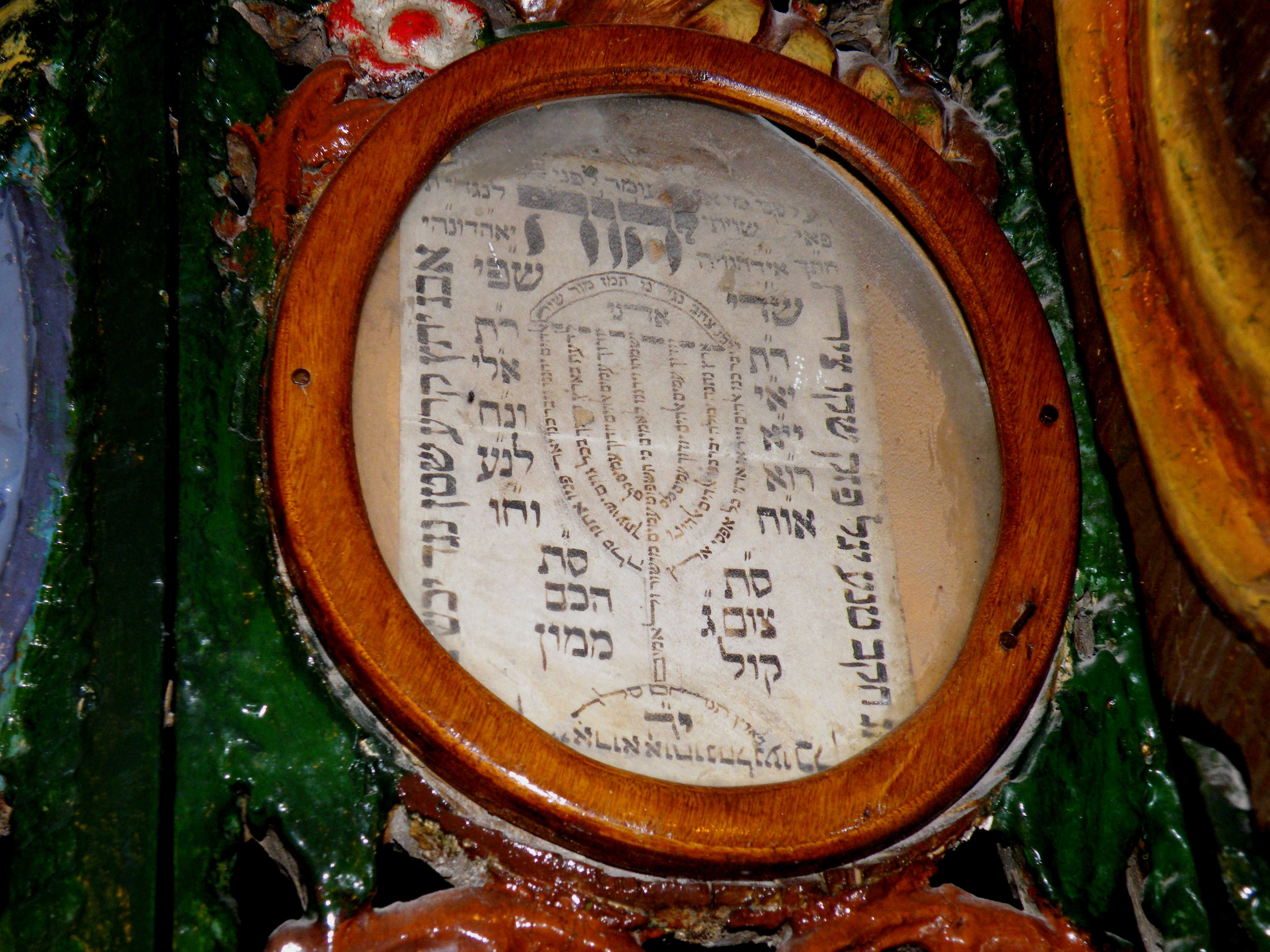 Ari Ashkenazi Synagogue, Safed.